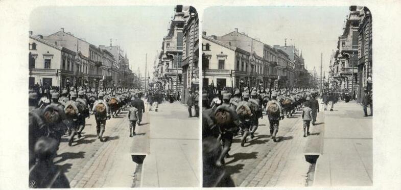 179. Krieg 1914-15. Einzug unserer siegreichen Truppen in Lodz Information added by Wikimedia users.